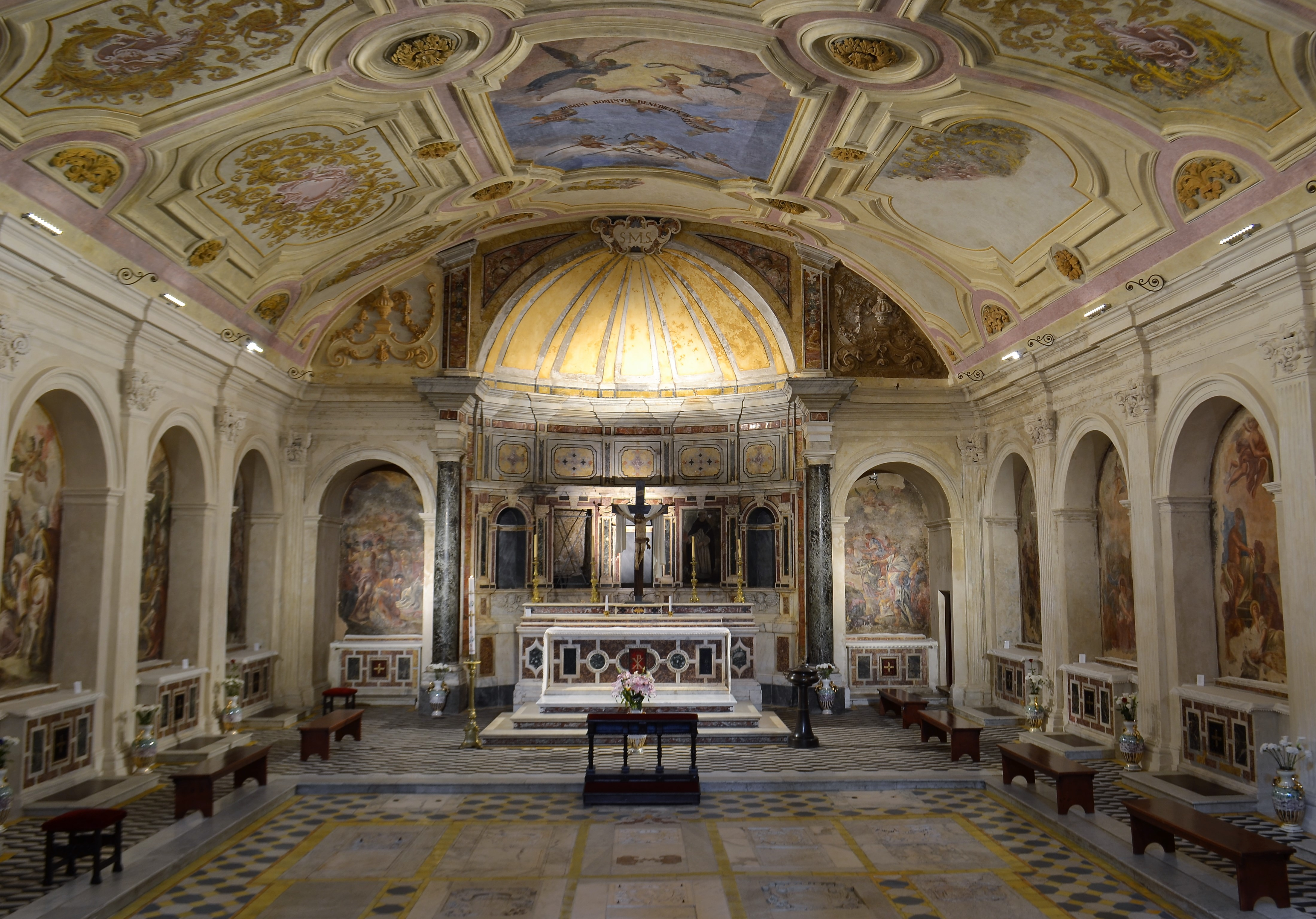 Cripta della Basilica di Santa Maria della Sanità di Napoli.